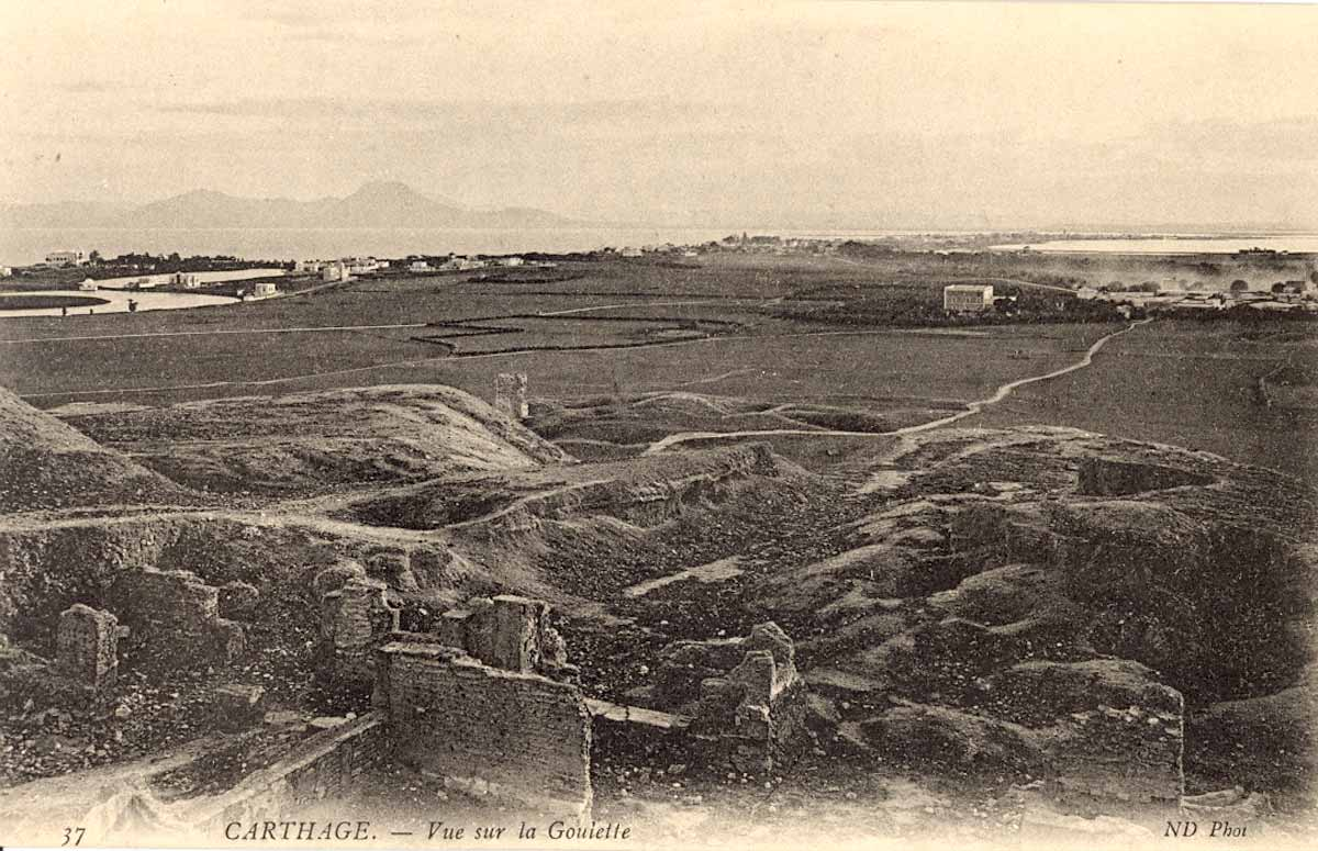 Carthage 1900 - Vue vers La Goulette